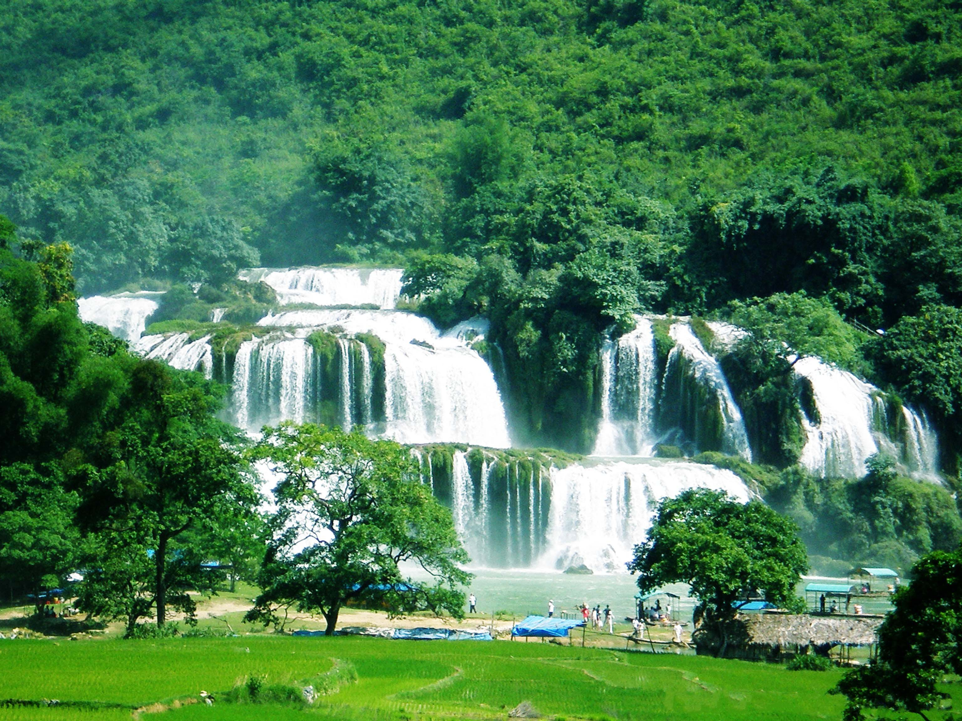 Photo by CaoBangPro Licensing Thể loại:Thác nước Việt Nam